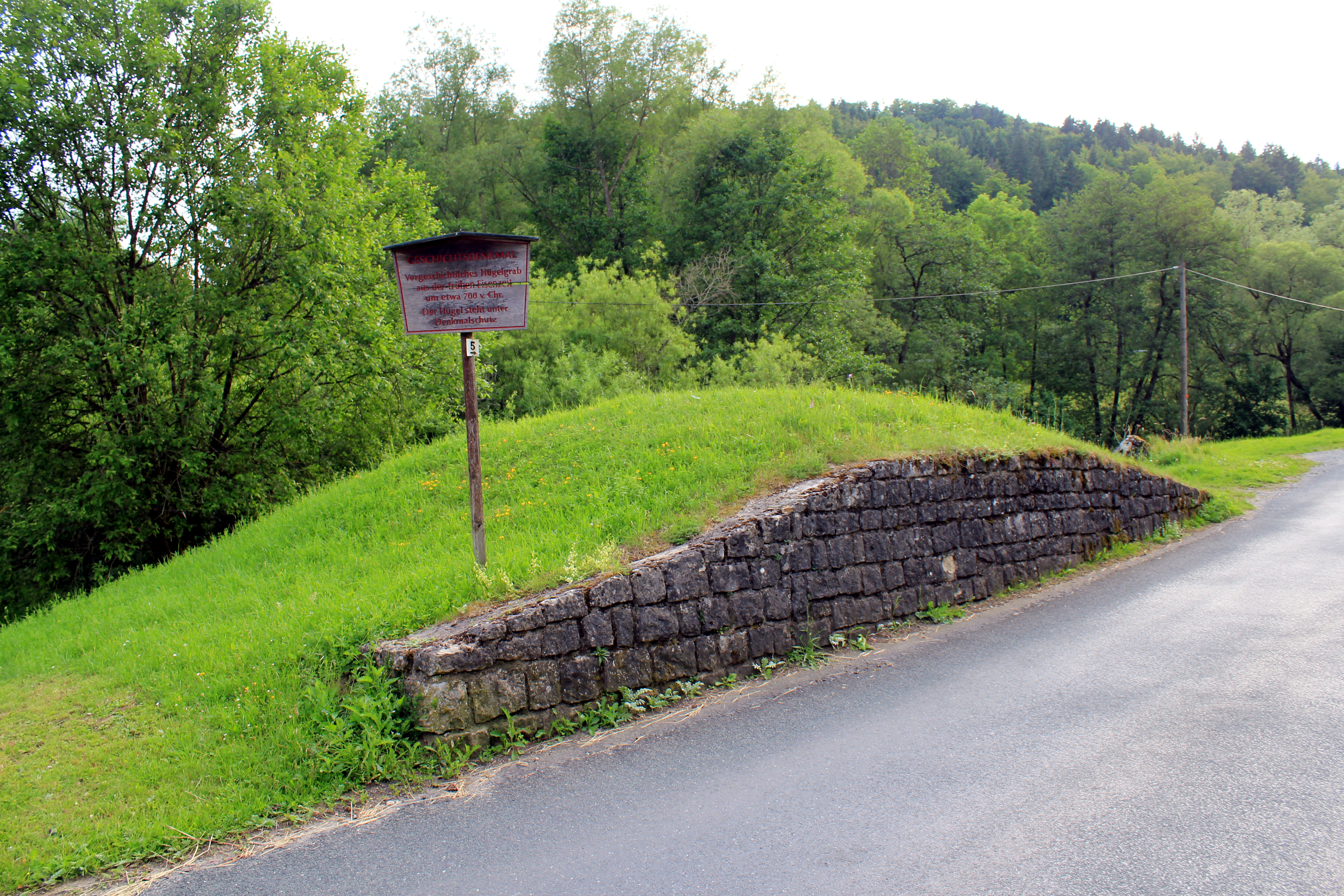 Grabhügel bei der Weihersmühle und späterer Standorf einer Motte